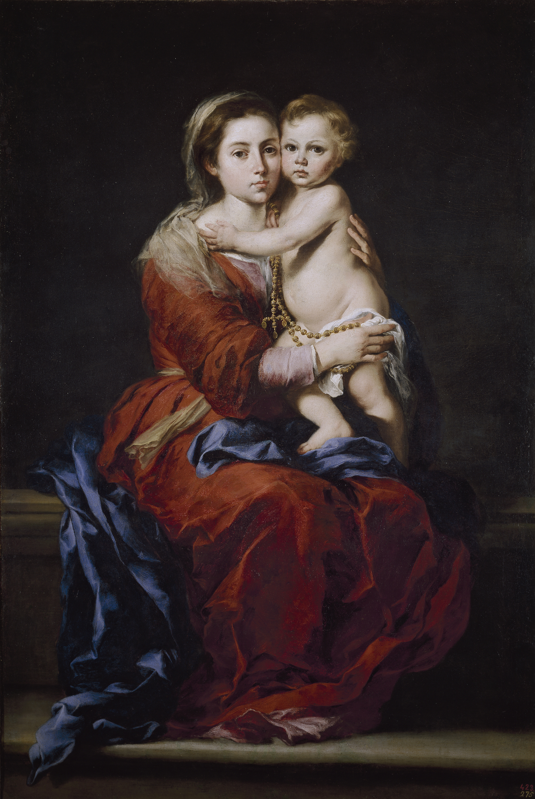 La obra representa a la Virgen María llevando al Niño Jesús sobre sus rodillas y un rosario.